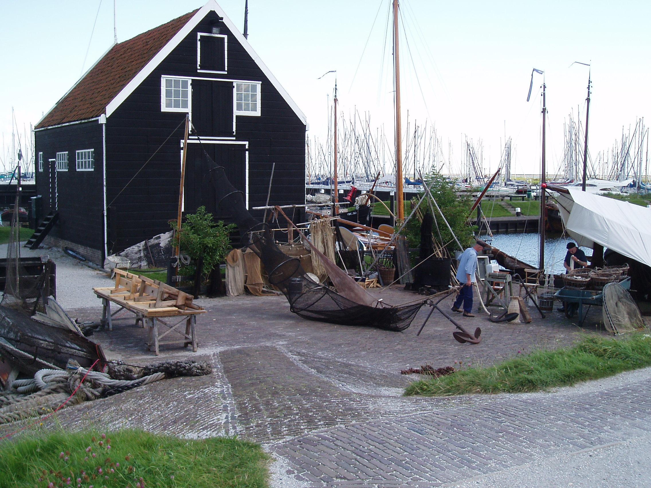 Zuiderzeemuseum in town Enkhuizen, the Netherlands